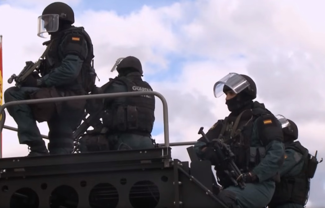 Su Majestad el Rey visita en Valdemoro la sede de la Unidad Especial de Intervención (UEI) de la Guardia Civil Valdemoro (Madrid), 21/03/2016.